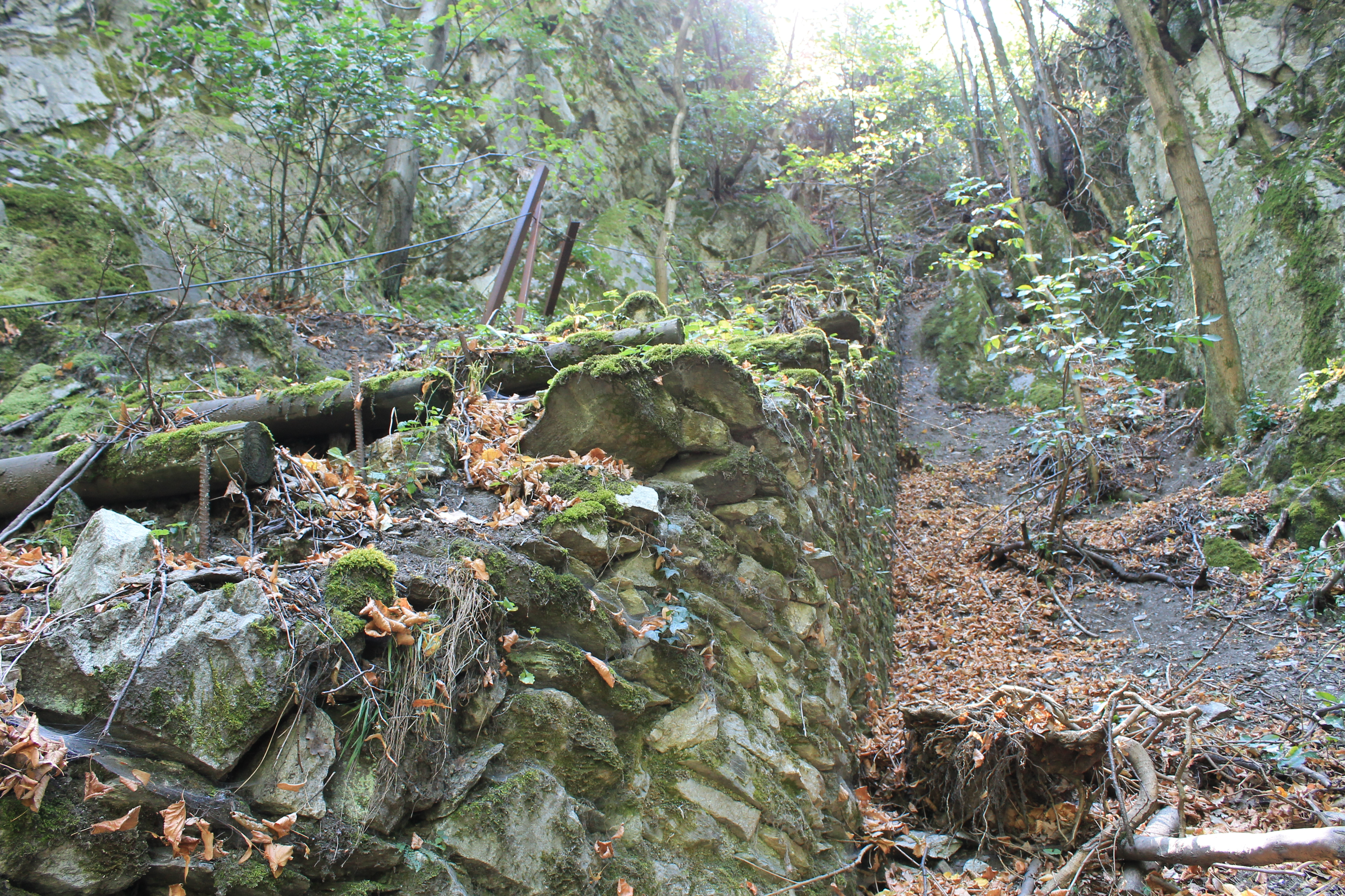 Vestiges de l'ancien escalier d'accès au château de Briançon.